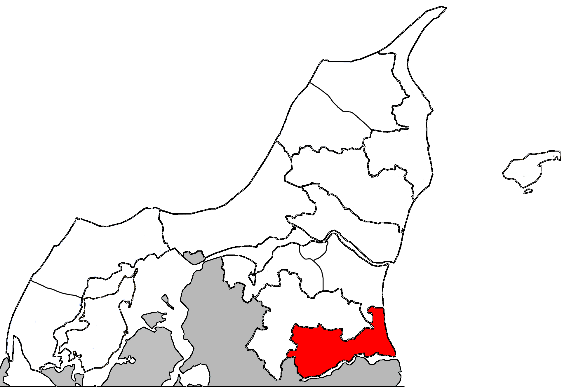 Hadsund Provstis beliggenhed i Aalborg Stift.